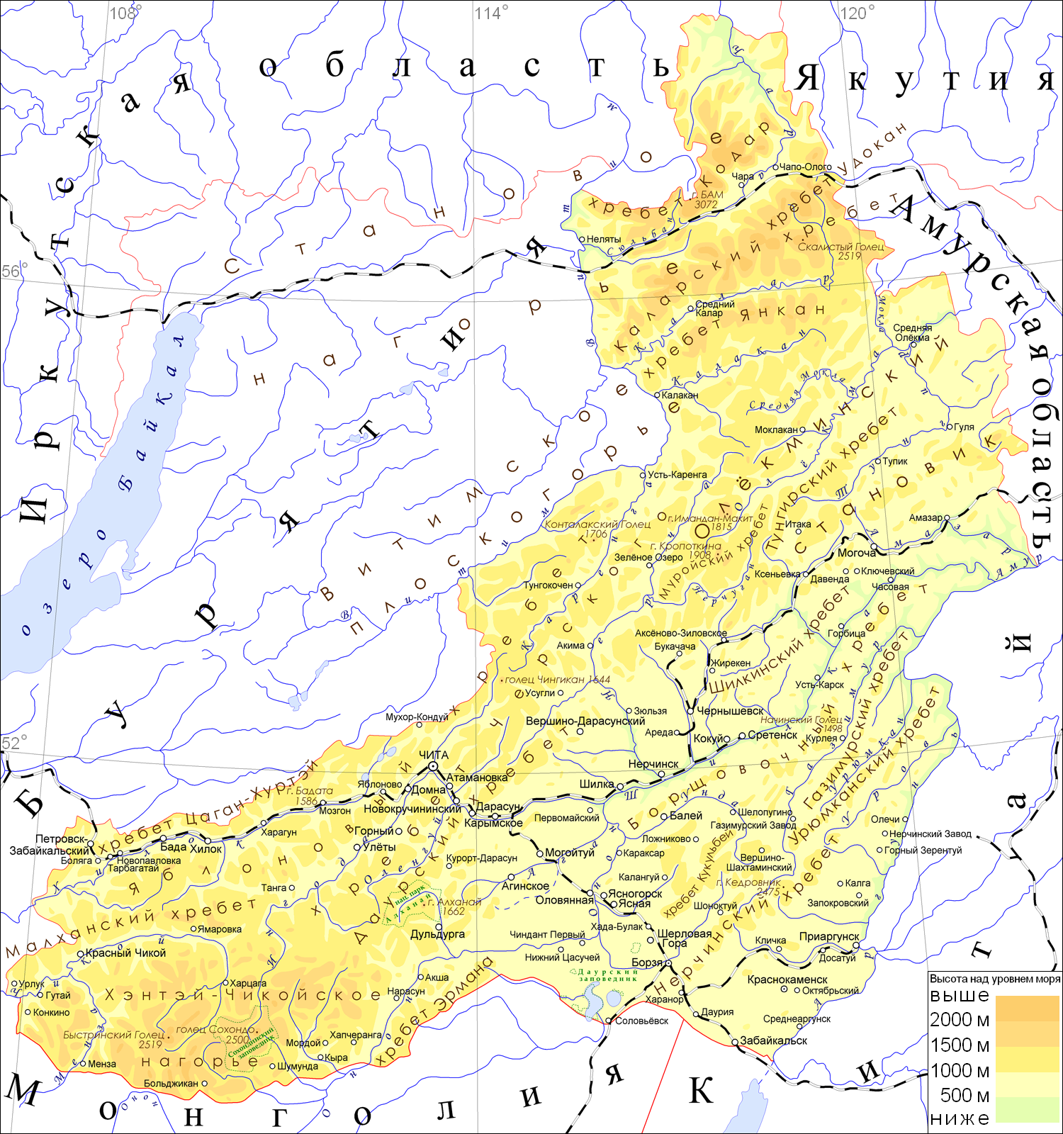 физическая карта Забайкальского края